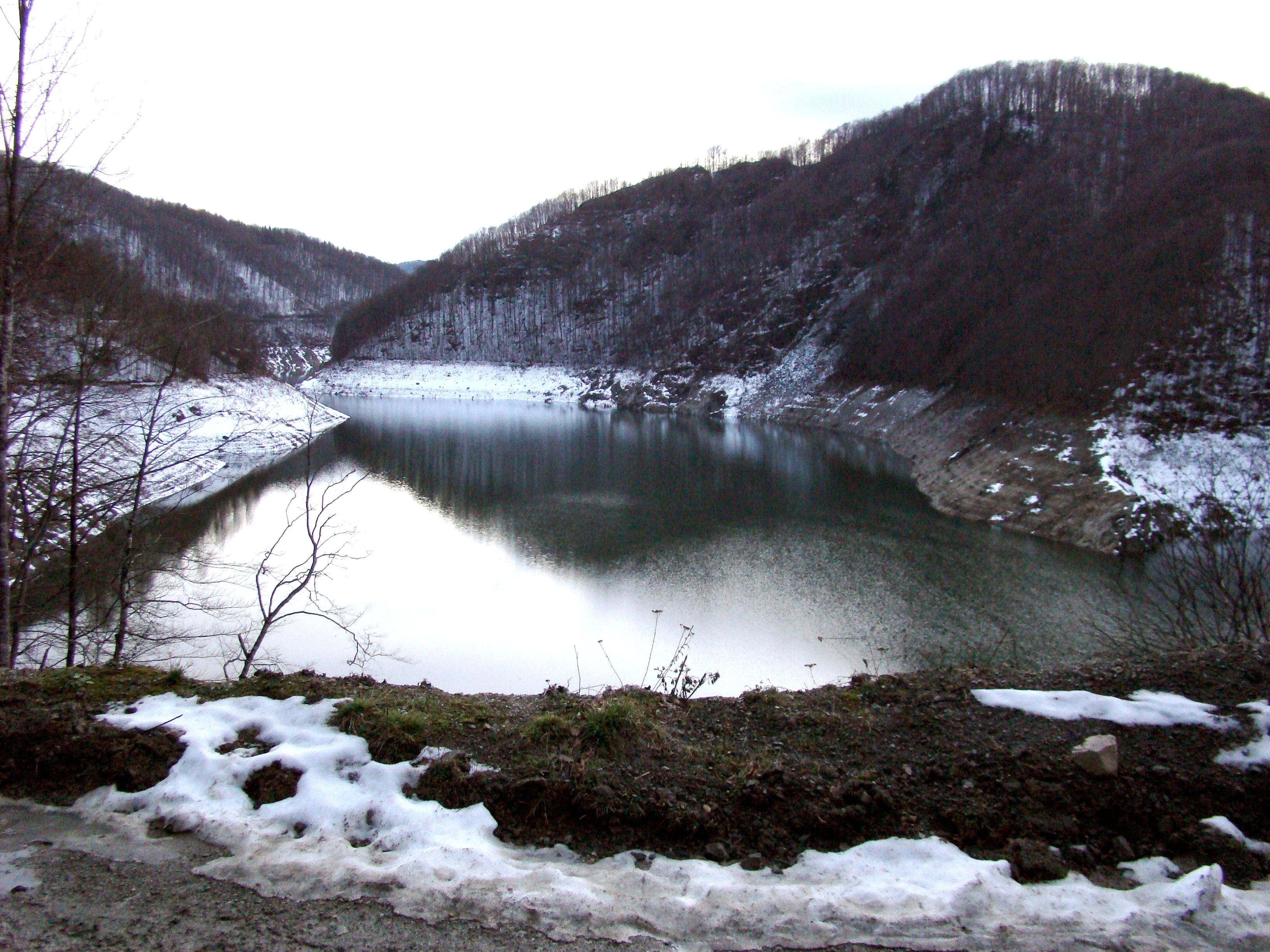 Barajul Leșu și zona învecinată